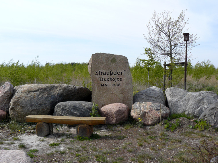 Gedenkstein in der Ortsmitte des devastierten Dorfes Straußdorf bei Spremberg /Brandenburg/ Deutschland